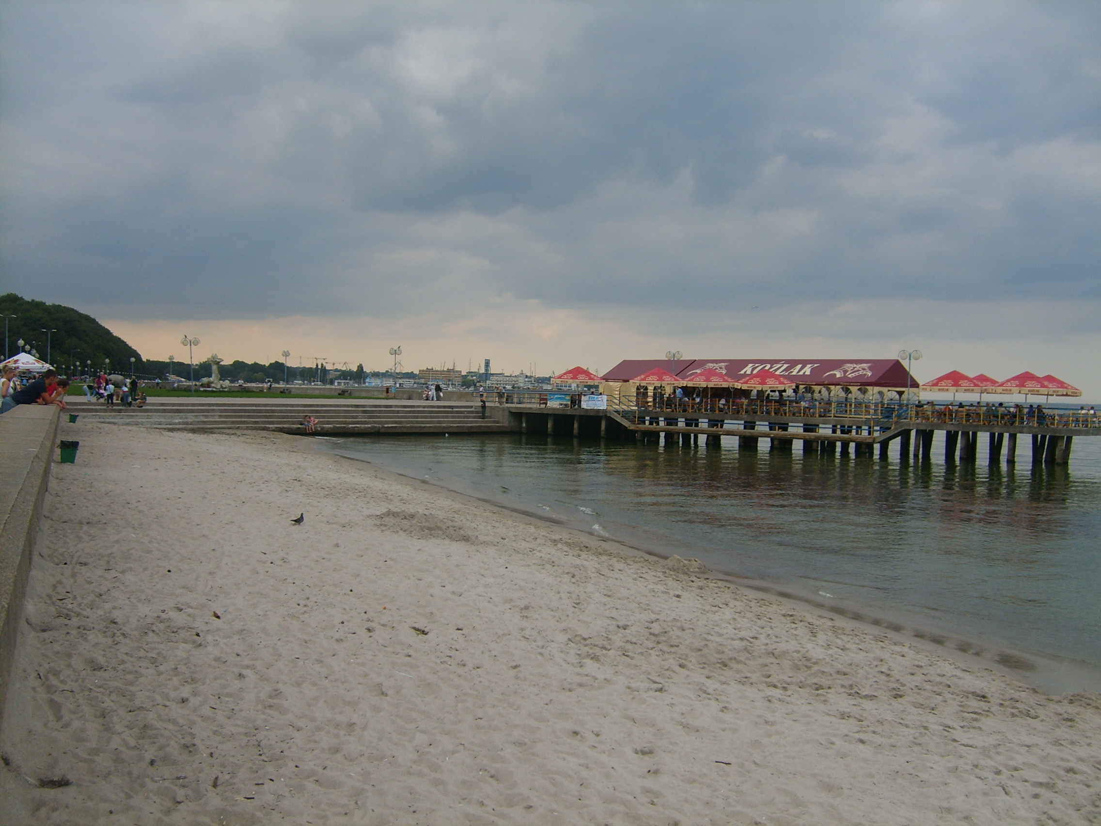 Bulwar Nadmorski - betonowy molo.